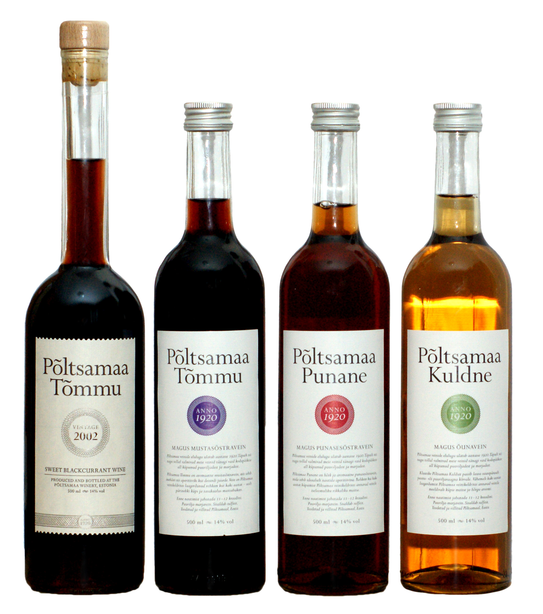 Põltsamaa Felixi veinid.